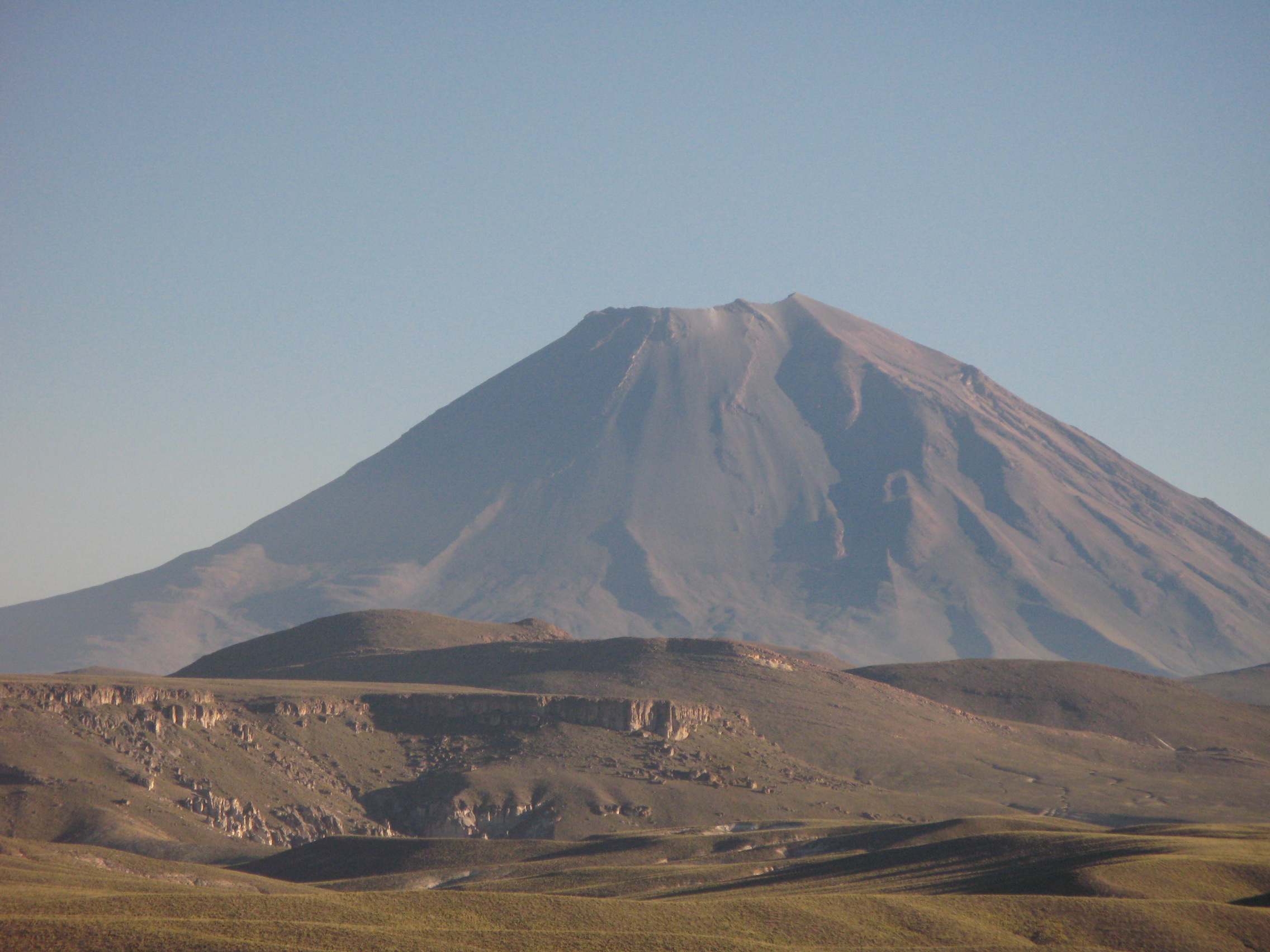 Vulkan Misti nad Arequipo